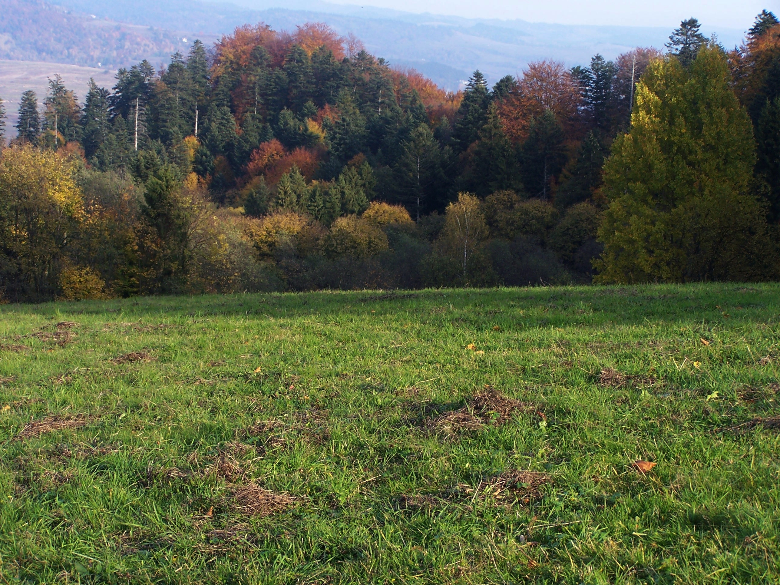 Polana Sosnów pod Sokolicą w Pieninach